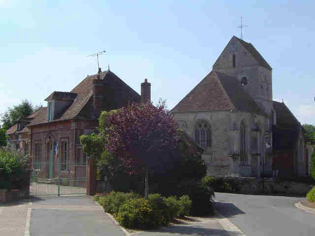 Mairie et église Saint-Lucien à Loconville (Oise, France)